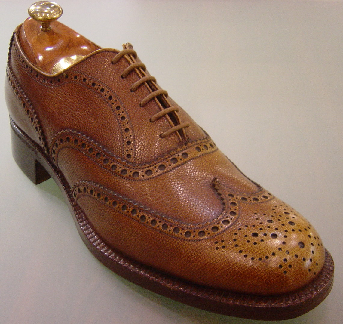 Beschreibung, was ist zu sehen/hören?